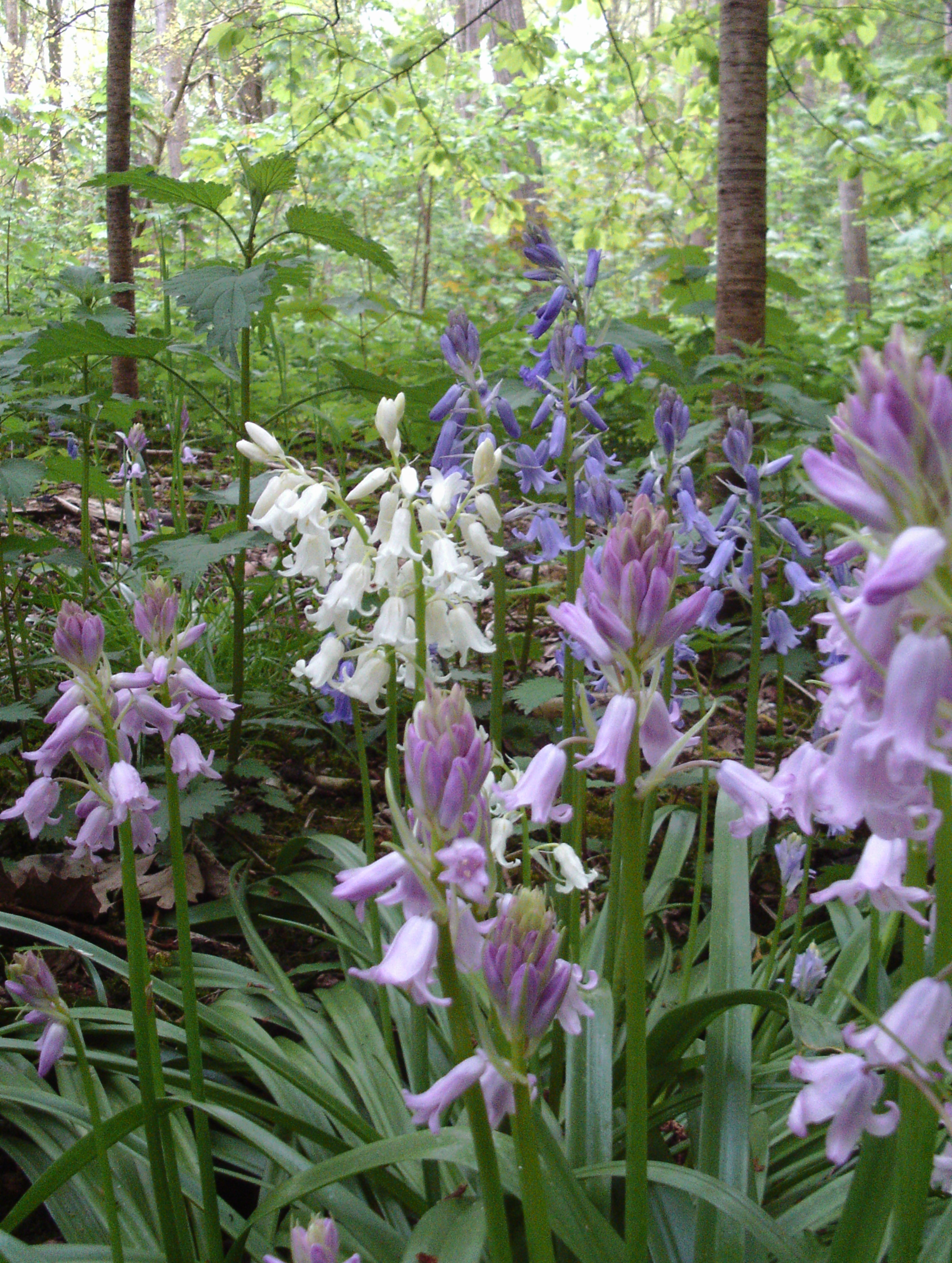 Hyacinthoides ×massartiana photo Nord Pas de Calais, France trois teinte différente 2017 04 27